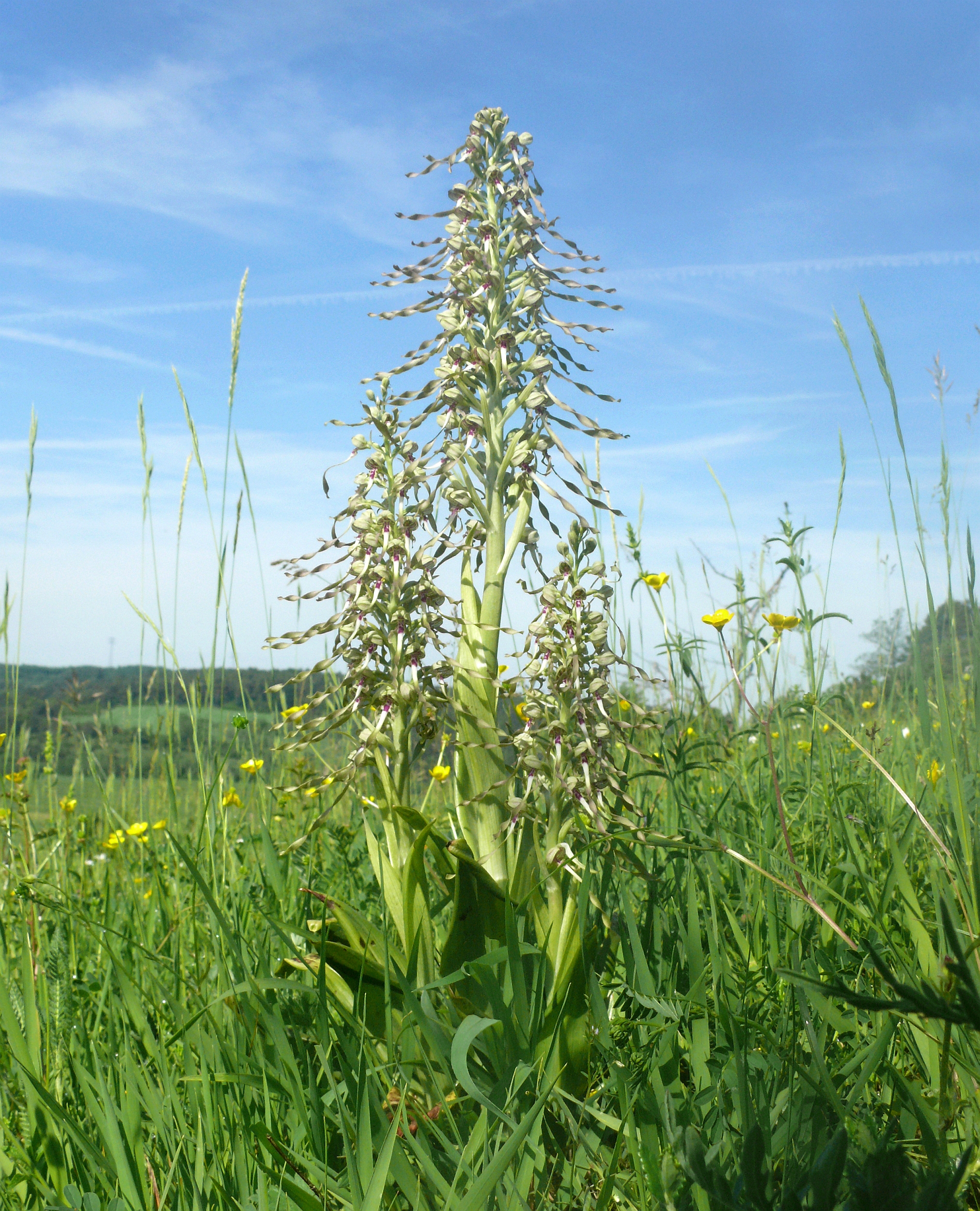 Himantoglossum hircinum, Naturraum „Bauland“